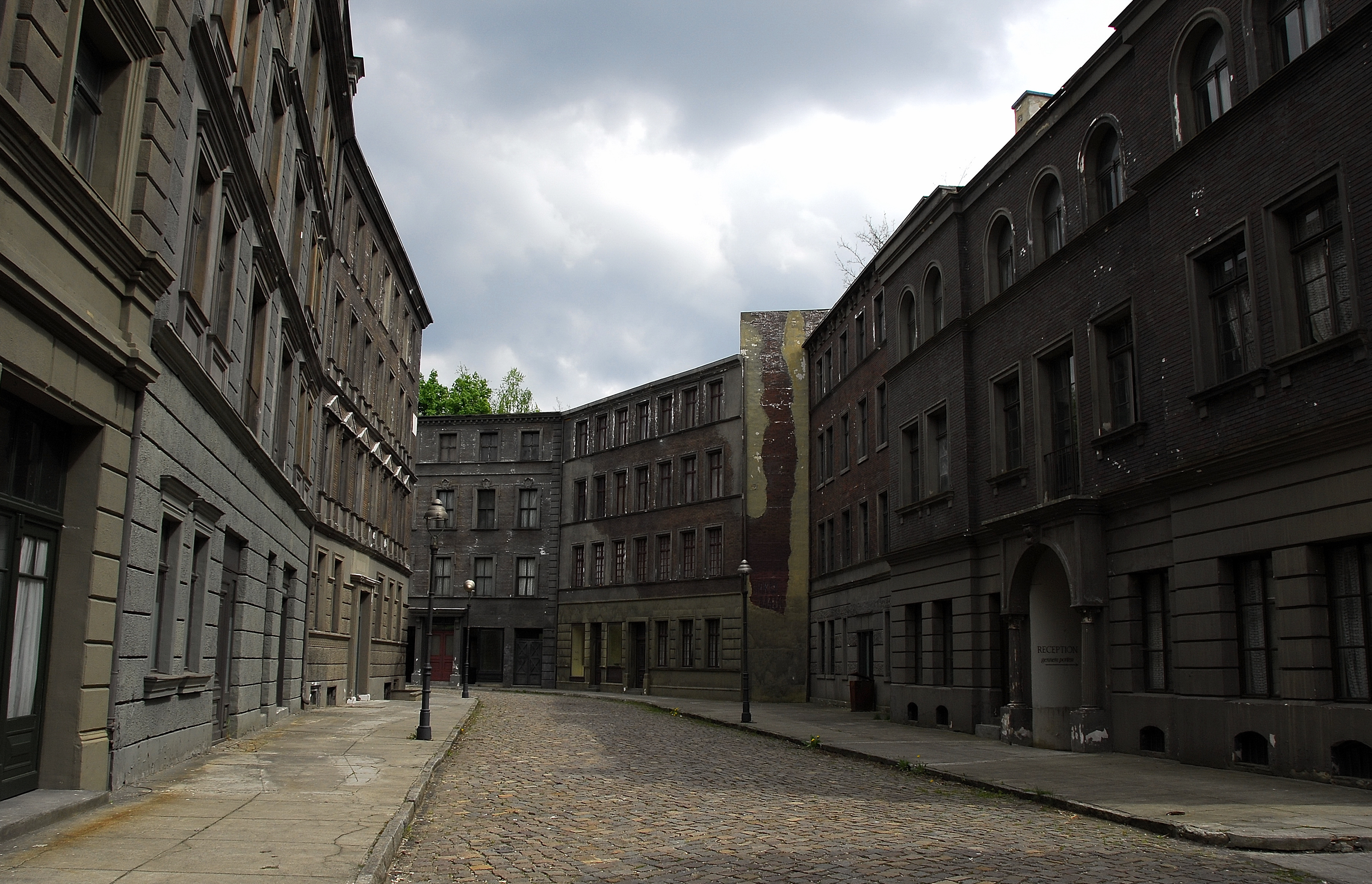 Babelsberg film studios, DEU - Il set nel quale son state girate elcune scene de "il Pianista" di Roman Polanski (2002).